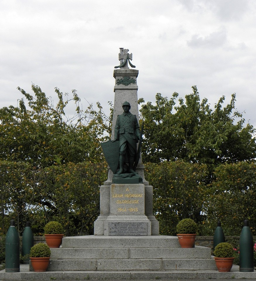 Monument aux morts du Pertre (35). .